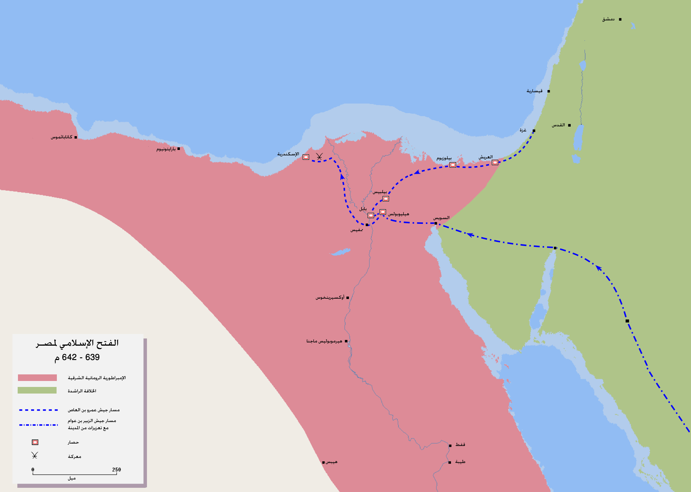 خريطة الفتح الإسلامي لمصر (639 - 642 م) بقيادة عمرو بن العاص، وبإسناد من جيش الزبير بن عوام.